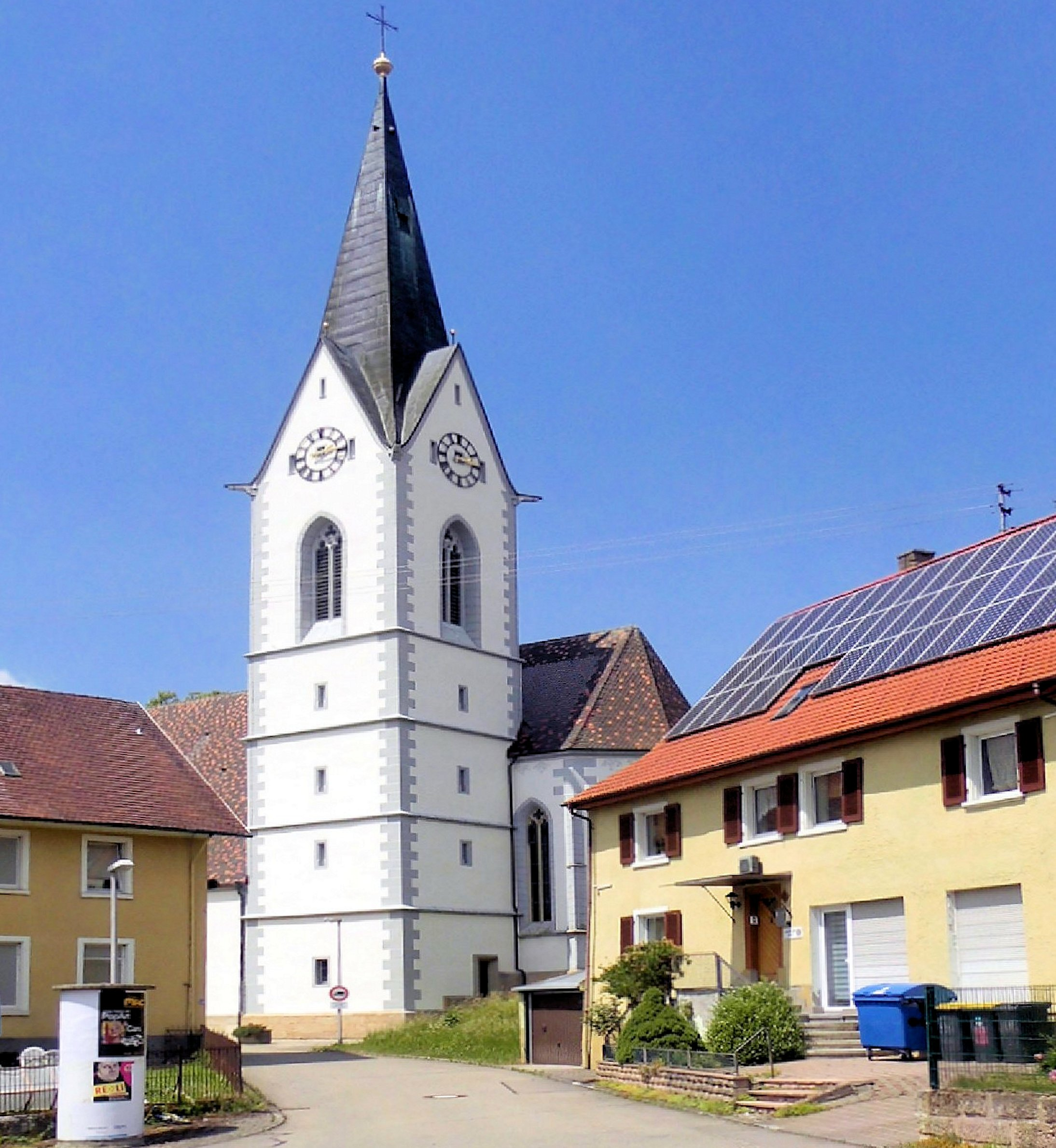 Wallfahrtskirche St. Michael in Leipferdingen, Stadt Geisingen